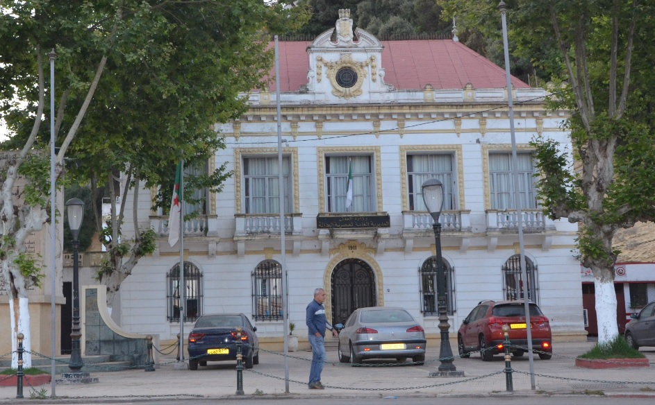 Ancienne mairie de Bir Mourad Raïs datant de 1911